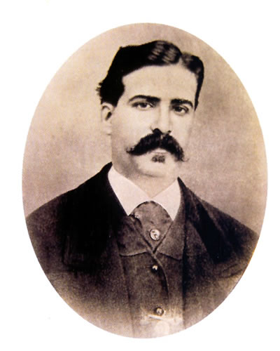 Salvador Sánchez Barbudo